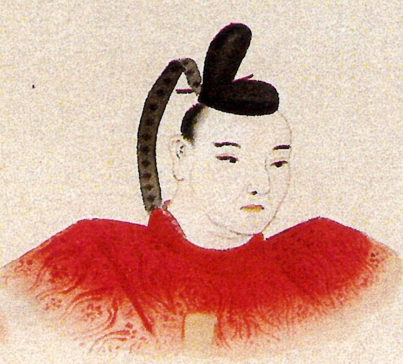 板倉重郷の肖像。